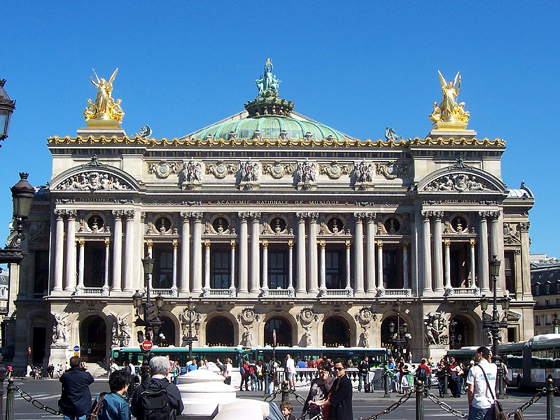 Parigi - Opera Garnier